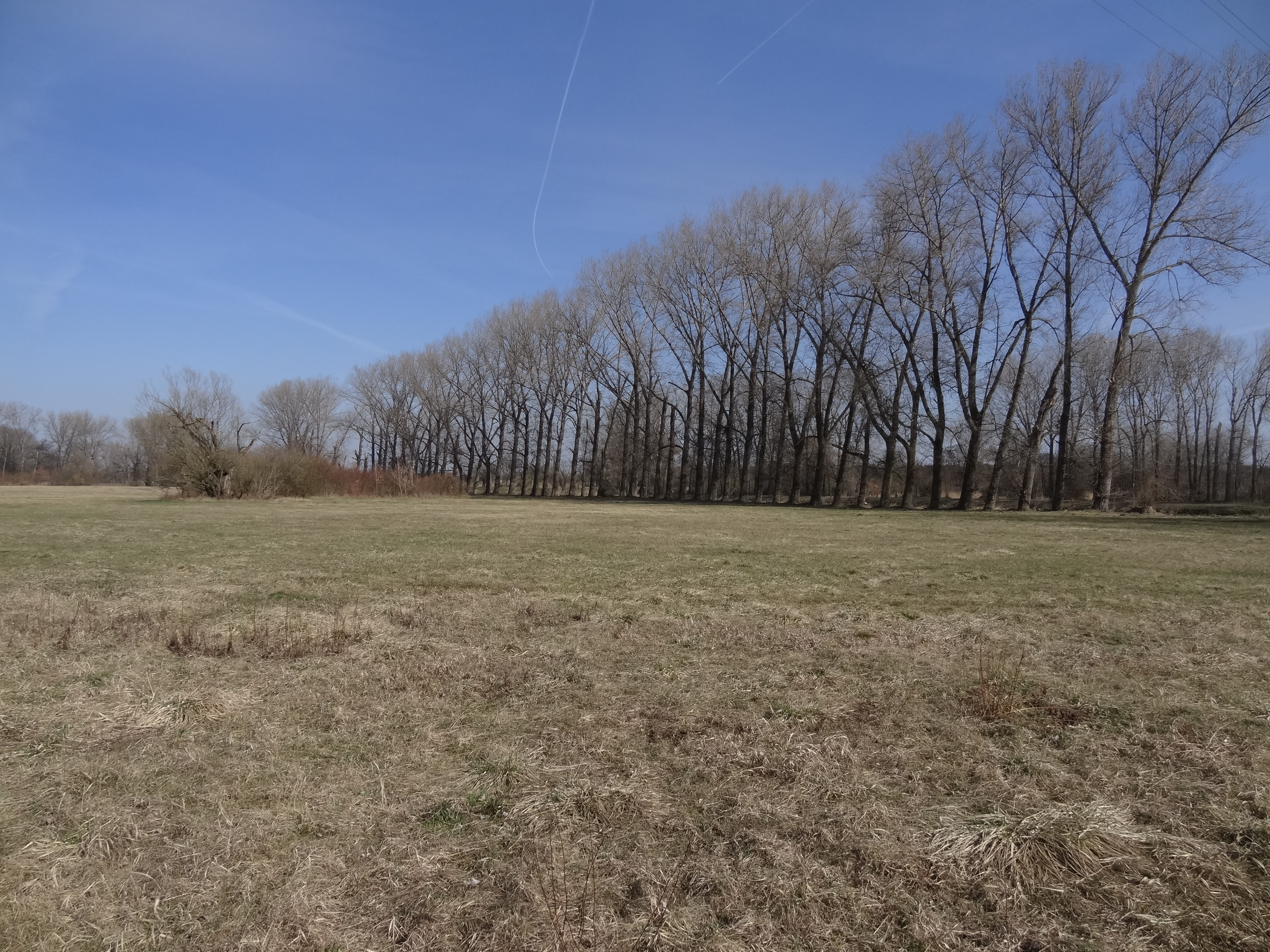 Blatné hradiště: V nivě Labe situované pozůstatky raně středověkého hradiště tzv. blatného typu; dochované jsou obvodové valy. Hradiště bylo založeno v meandru řeky na terasovité vyvýšenině. Lokalita: Na levém břehu Labe, mezi Jiřicemi a Lobkovicemi, Kozly (Tišice).